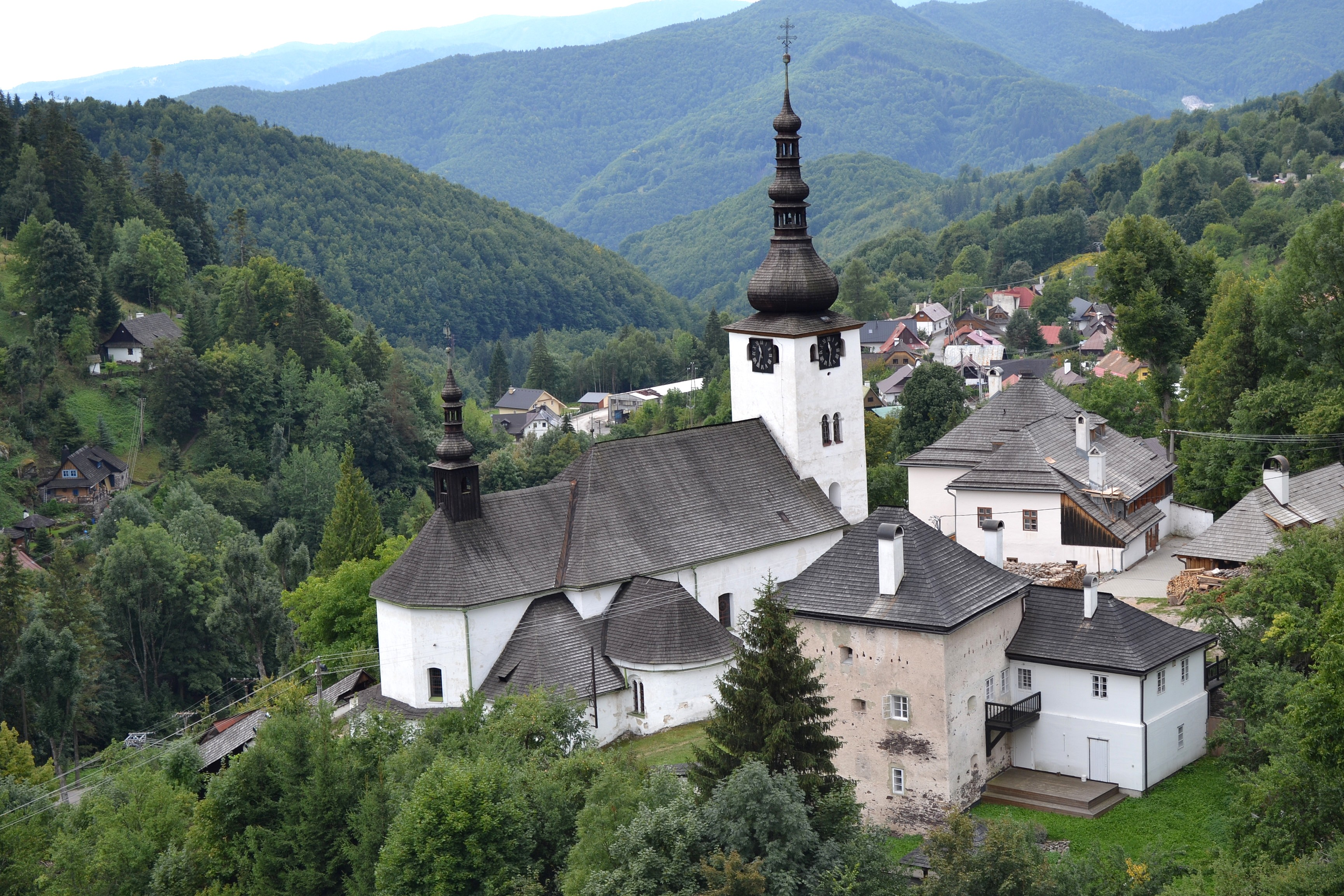 Špania Dolina (okr. Banská Bystrica); pohľad na obec s Kostolom Premenenia Pána